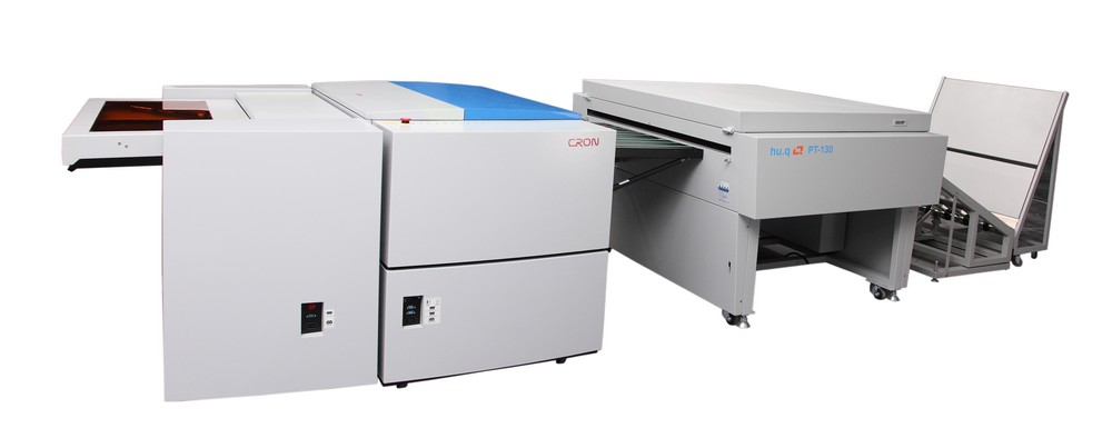 Computer to plate (CTP) de la marque CRON